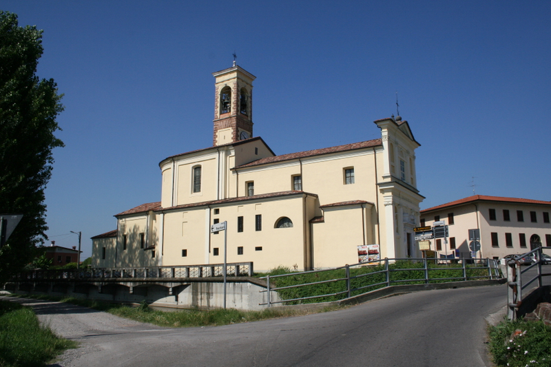 Pumenengo (Bg), la parrocchiale.